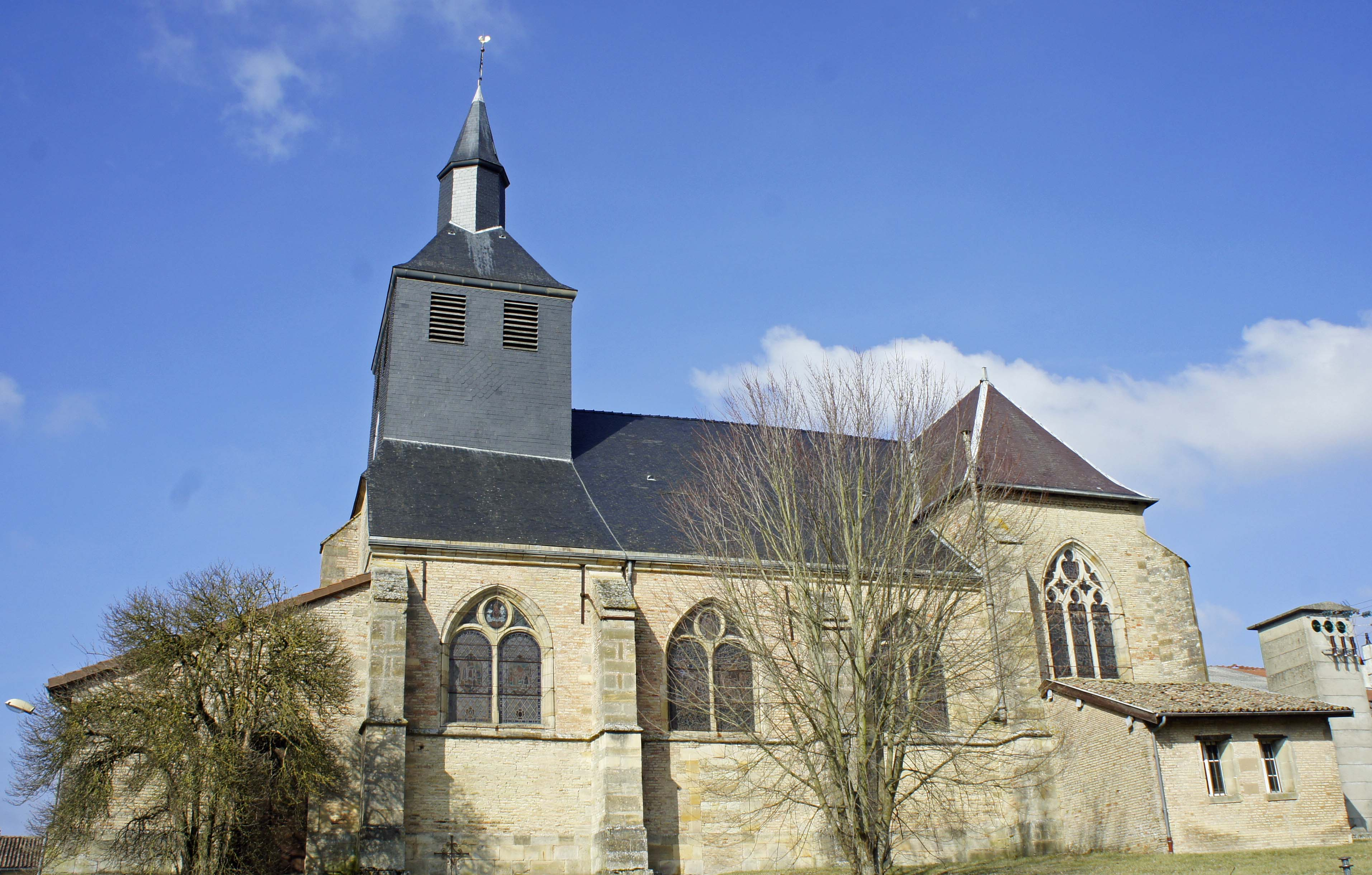 Passavant, vue de l' église.